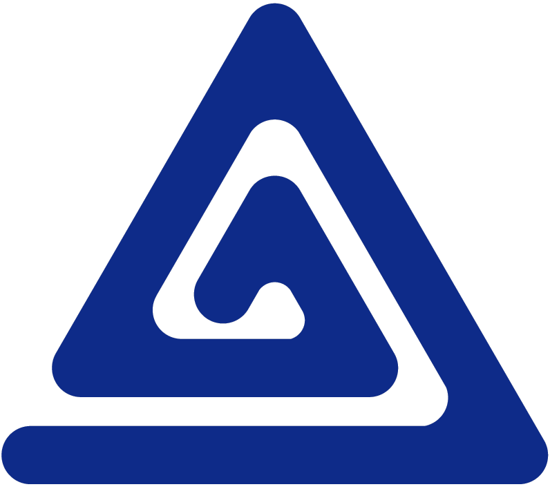 Le blogo officiel